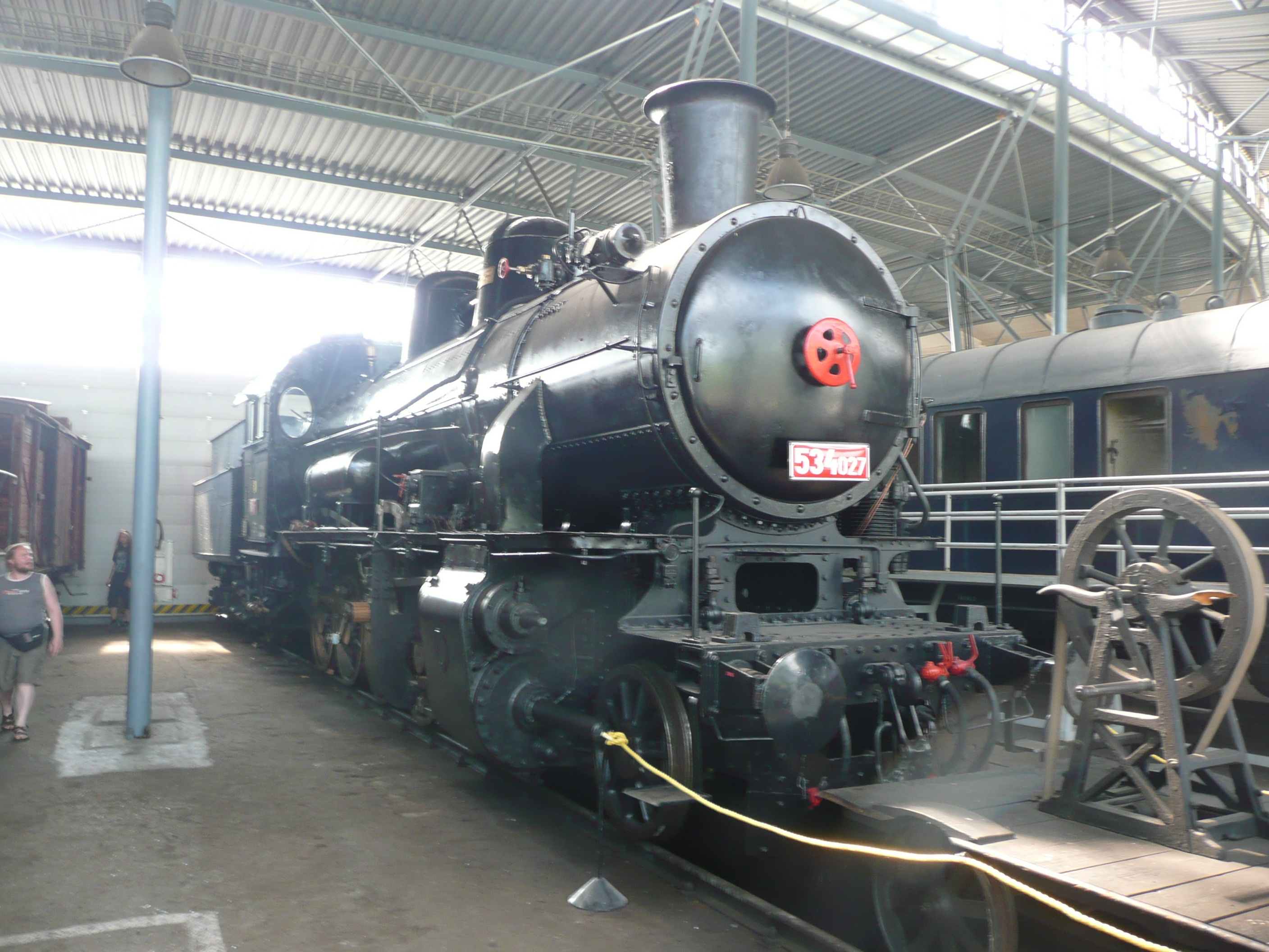 534.027 des NTM im Heizhaus von Chomutov